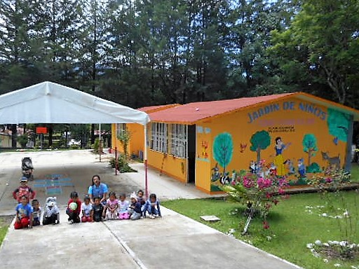 Jardín de niños de San Juan Achiutla, Estado de Oaxaca, México. 2017.